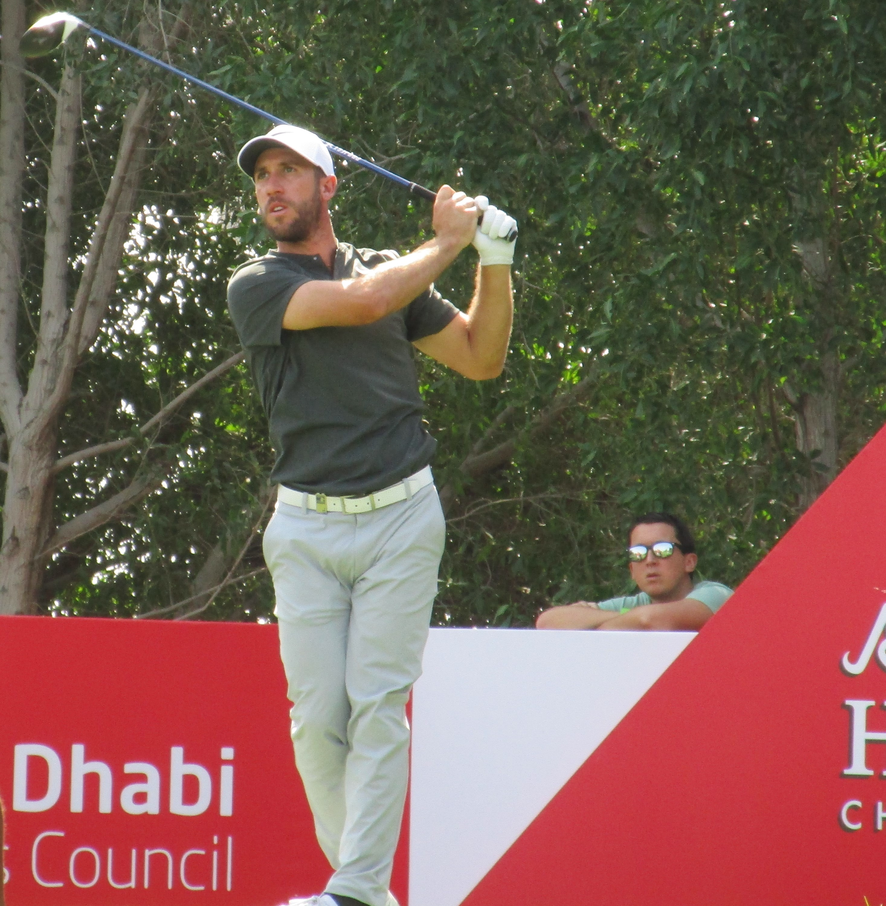 Abu Dhabi Championship 2018